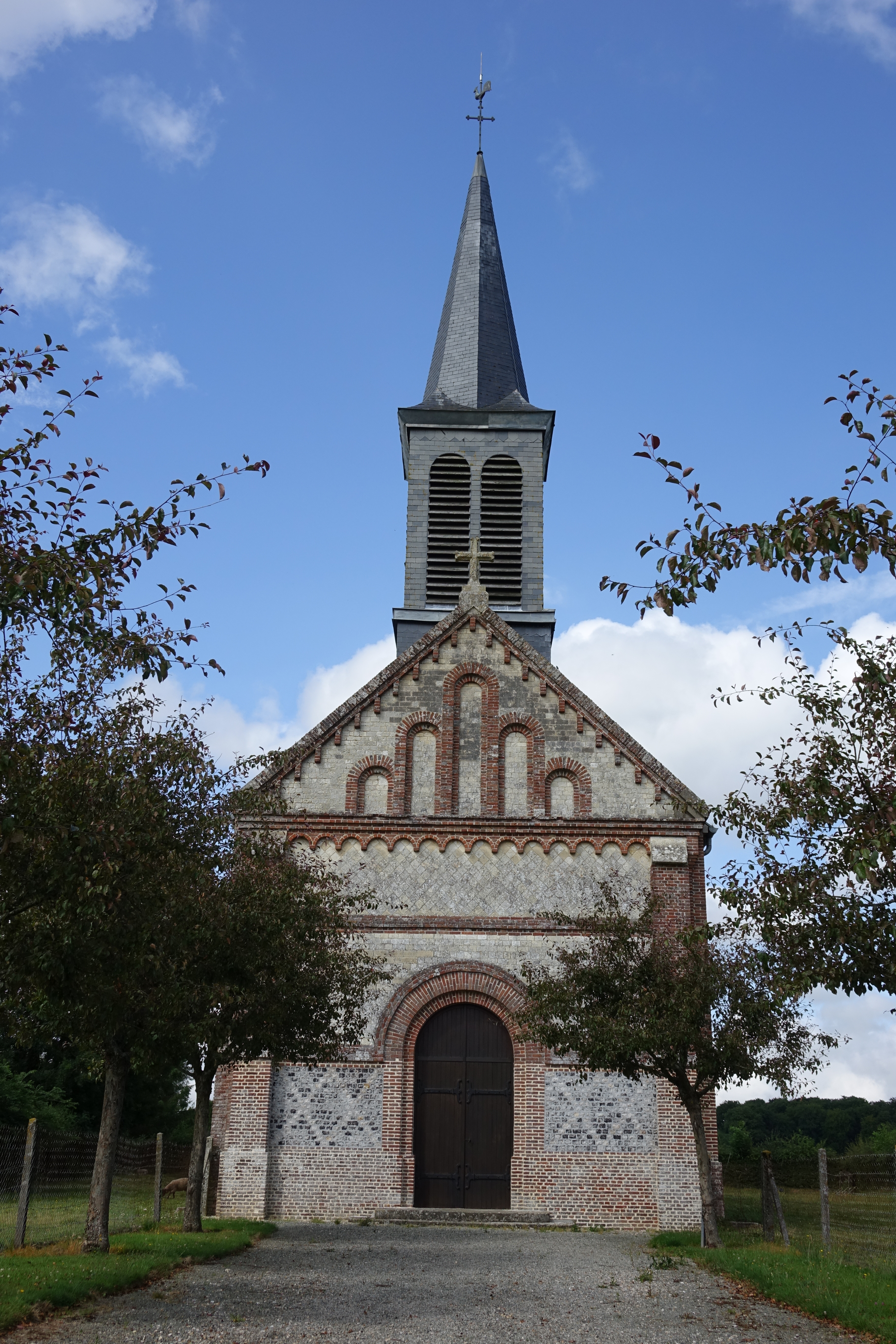 Église de Ventes-Saint-Rémy, Seine-Maritime, France